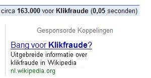 Zelfgemaakte media. 'nep-screenshot' (geen echt screenshot dus).